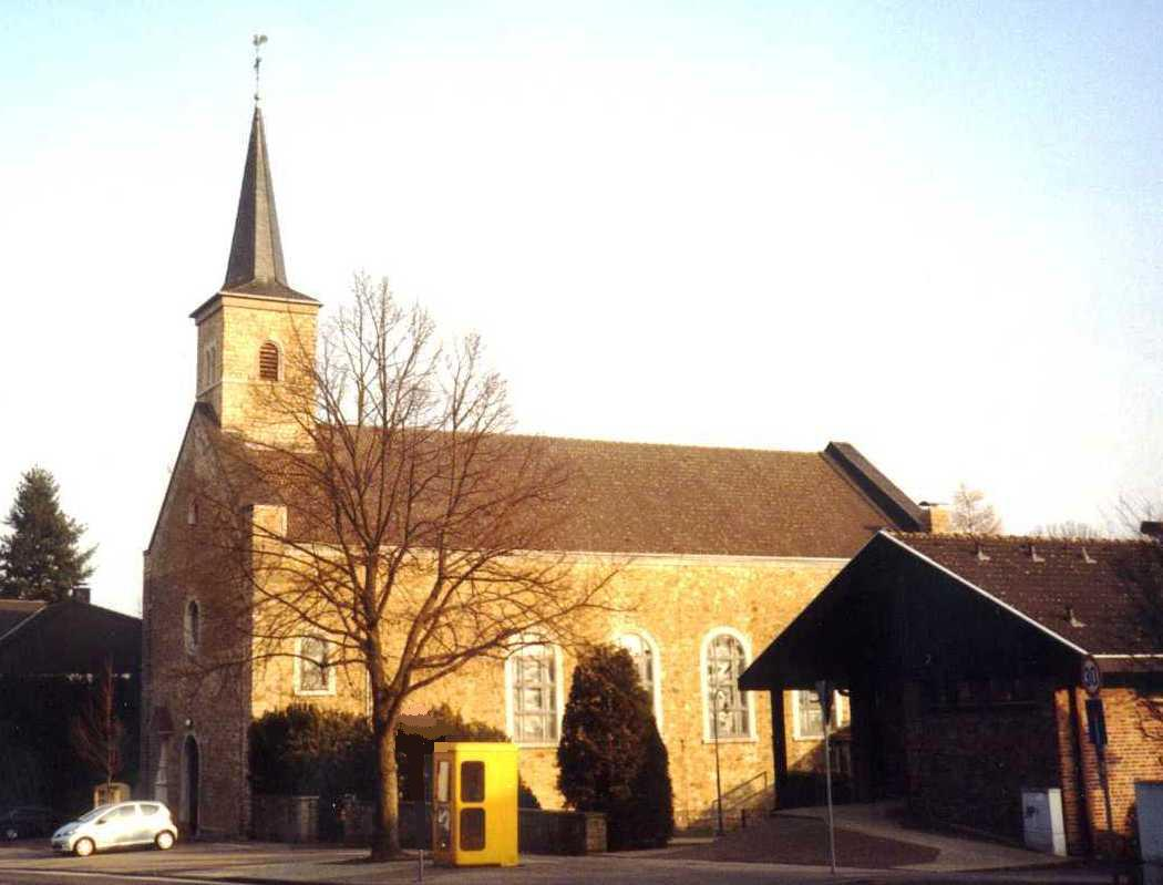 Katholische Kirche St. Antonius im Eschweiler Stadtteil Röhe